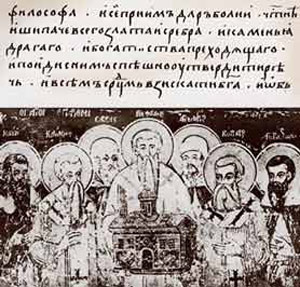 Kirill_Mefodji_s_utzenikami